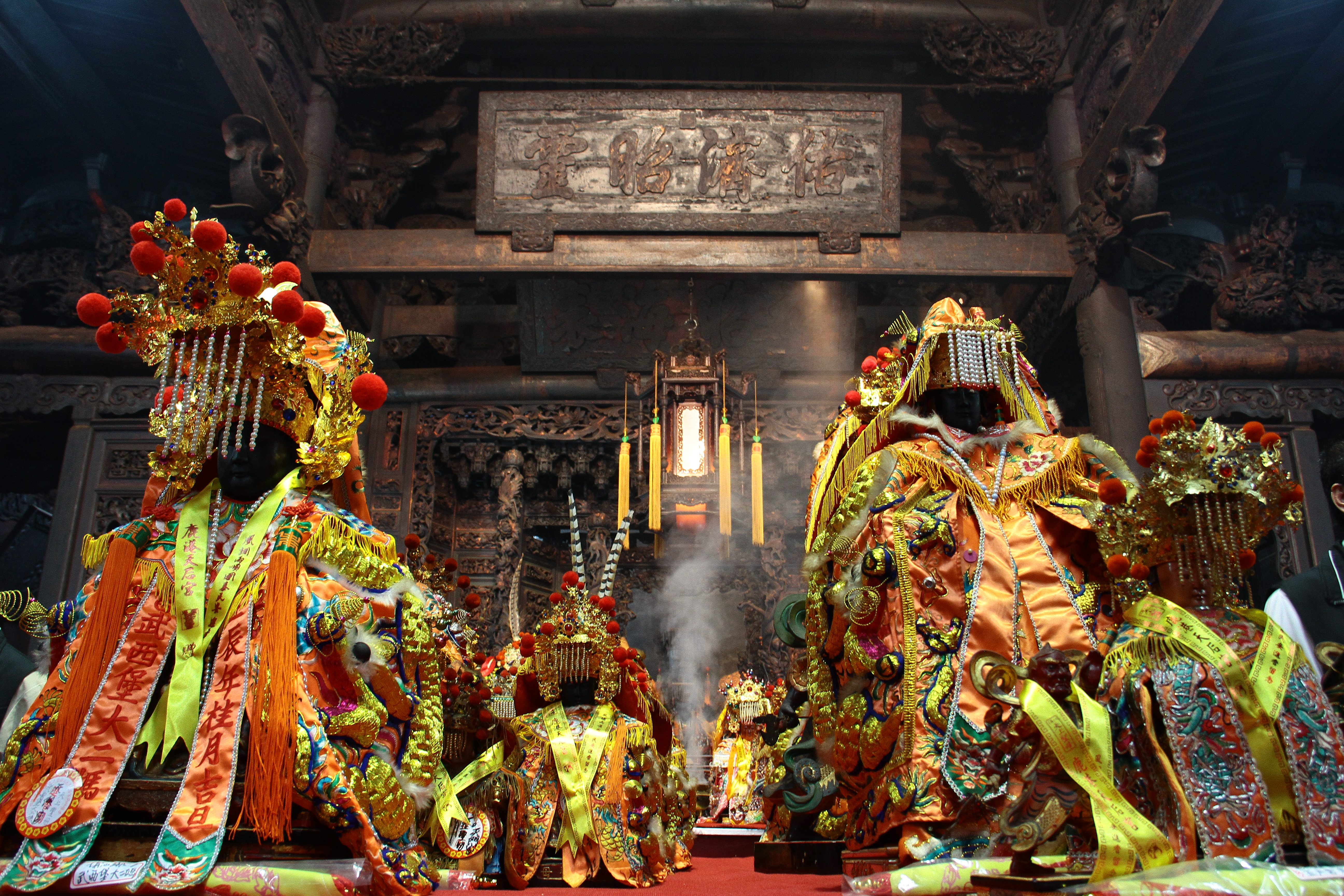 鹿港天后宮